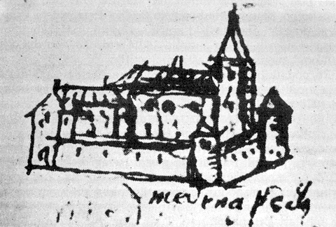 Skica Mirne Peči topografa Ivana Klobučarića iz leta 1603 prikazuje kraj kot utrjen tabor.